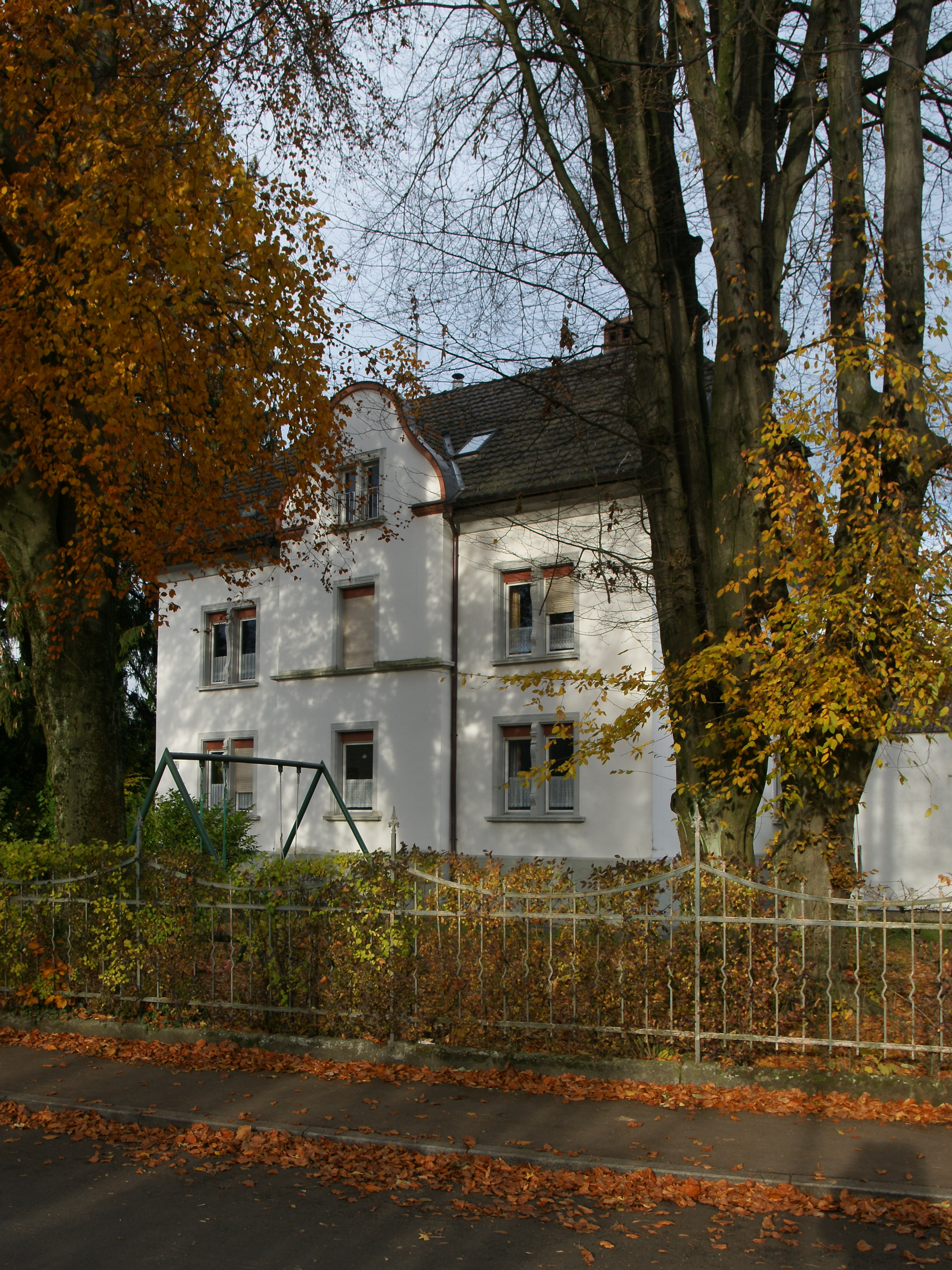 aus dem DEHIO Vorarlberg 1983: Bregenz Blumenstrasse Nr.5: Villa im Heimatstil, Krüppelwalmdach übergiebelter Mittelrisalit, Giebelfelder geschindelt.